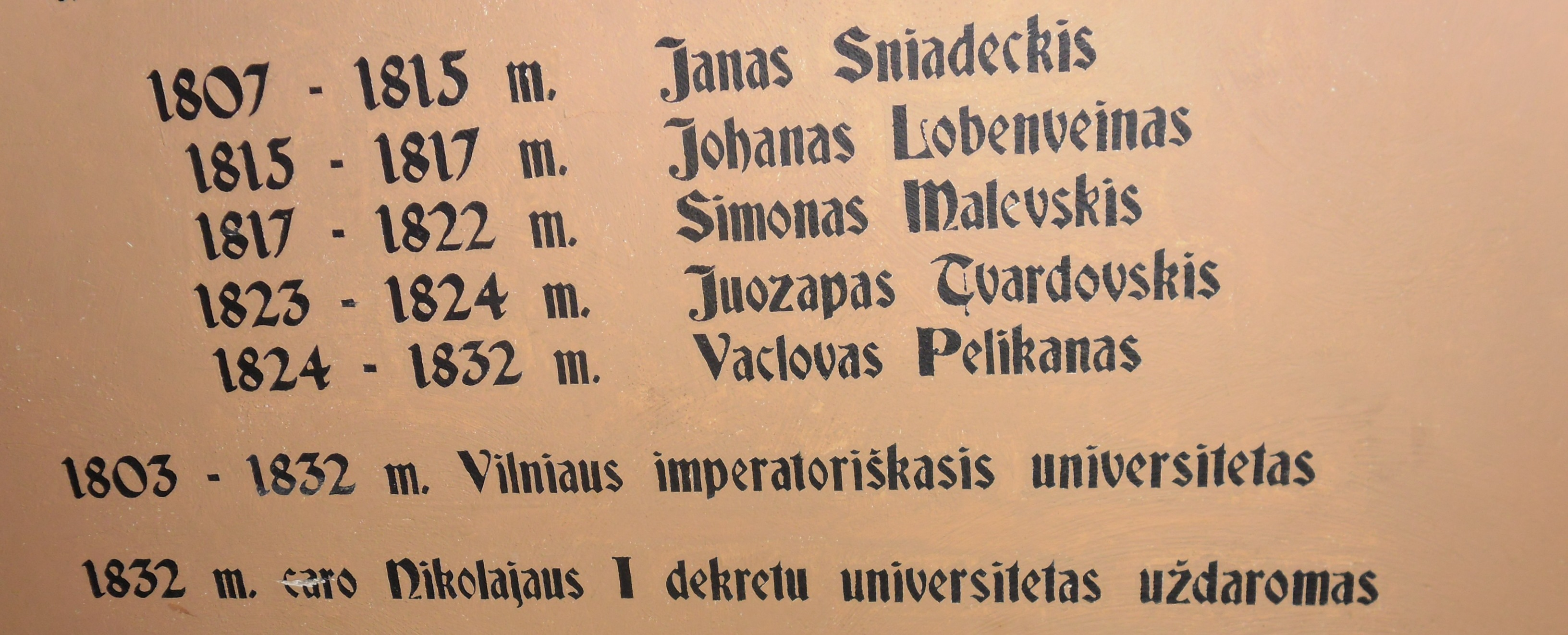 Список ректоров Императорского Виленского университета в арке бывшей библиотеки университета